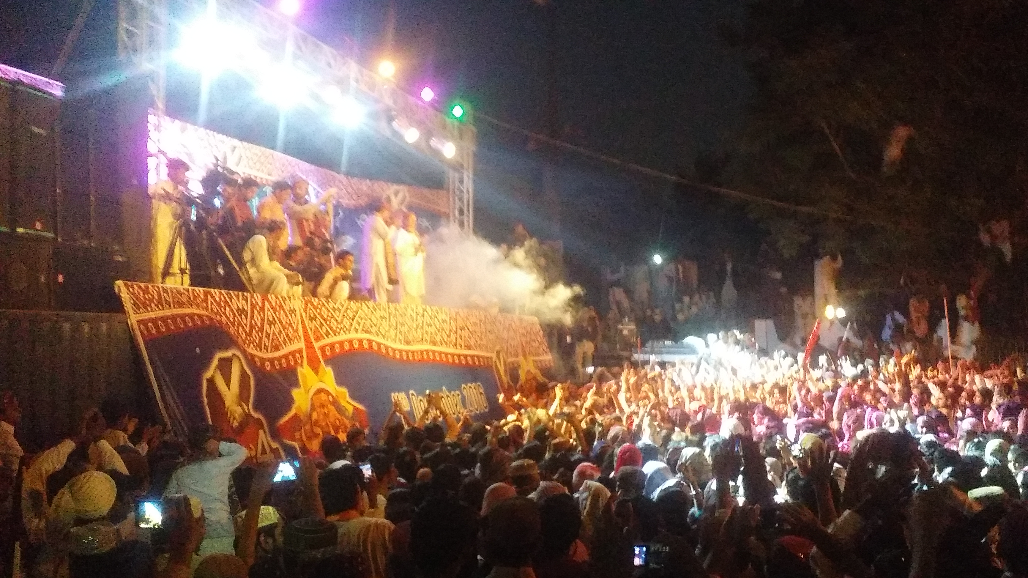 سنڌي: سنڌي ثقافتي ڏينهن 2016